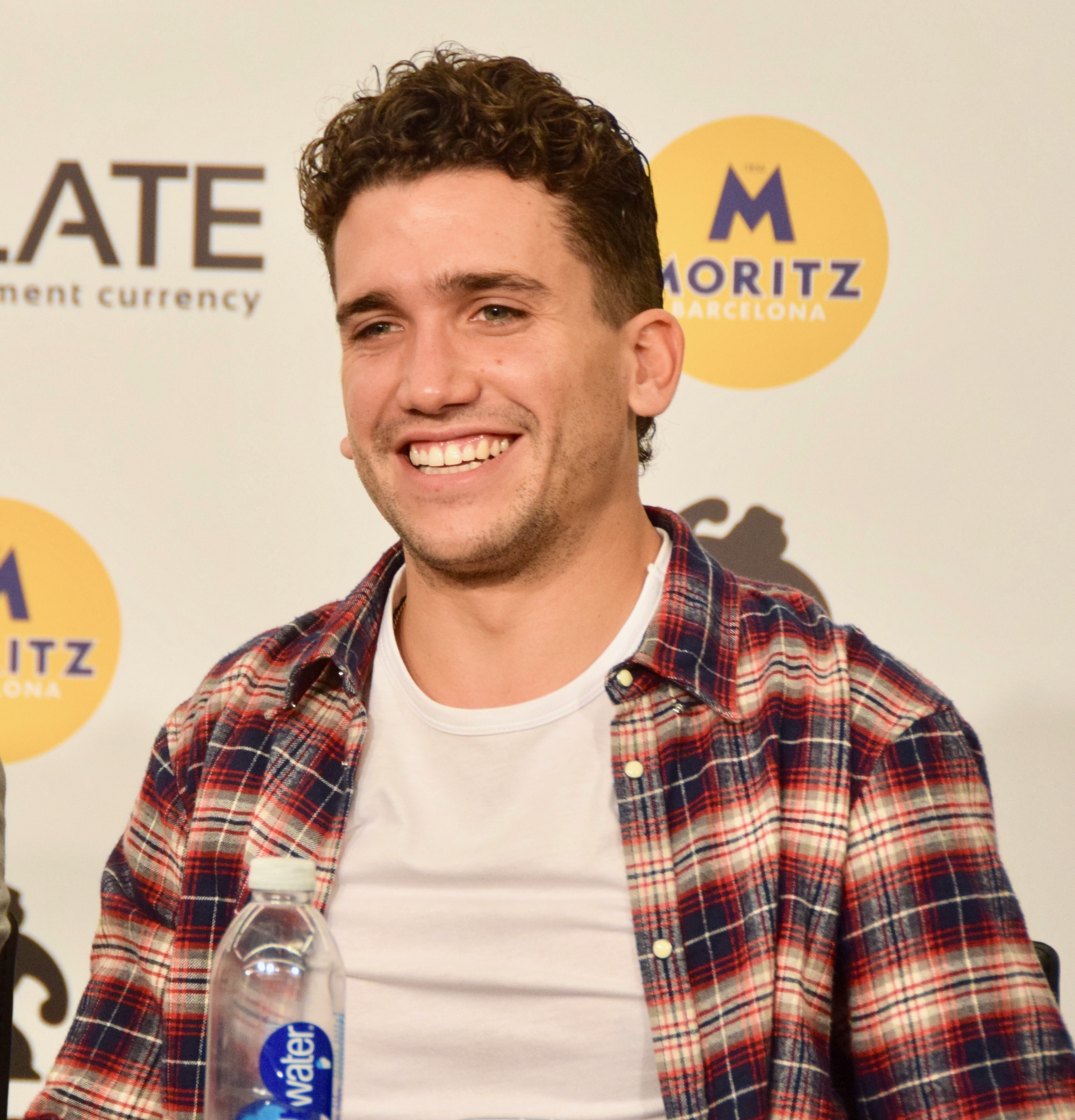 Festival de cinema de Sitges 2018